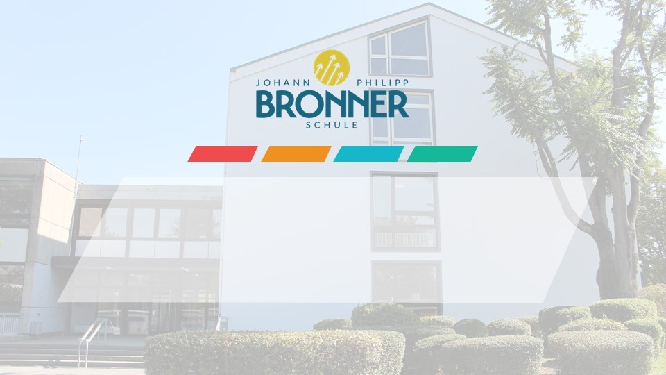 Die Johann Philipp Bronner Schule in Wiesloch an der Gymnasiumstraße